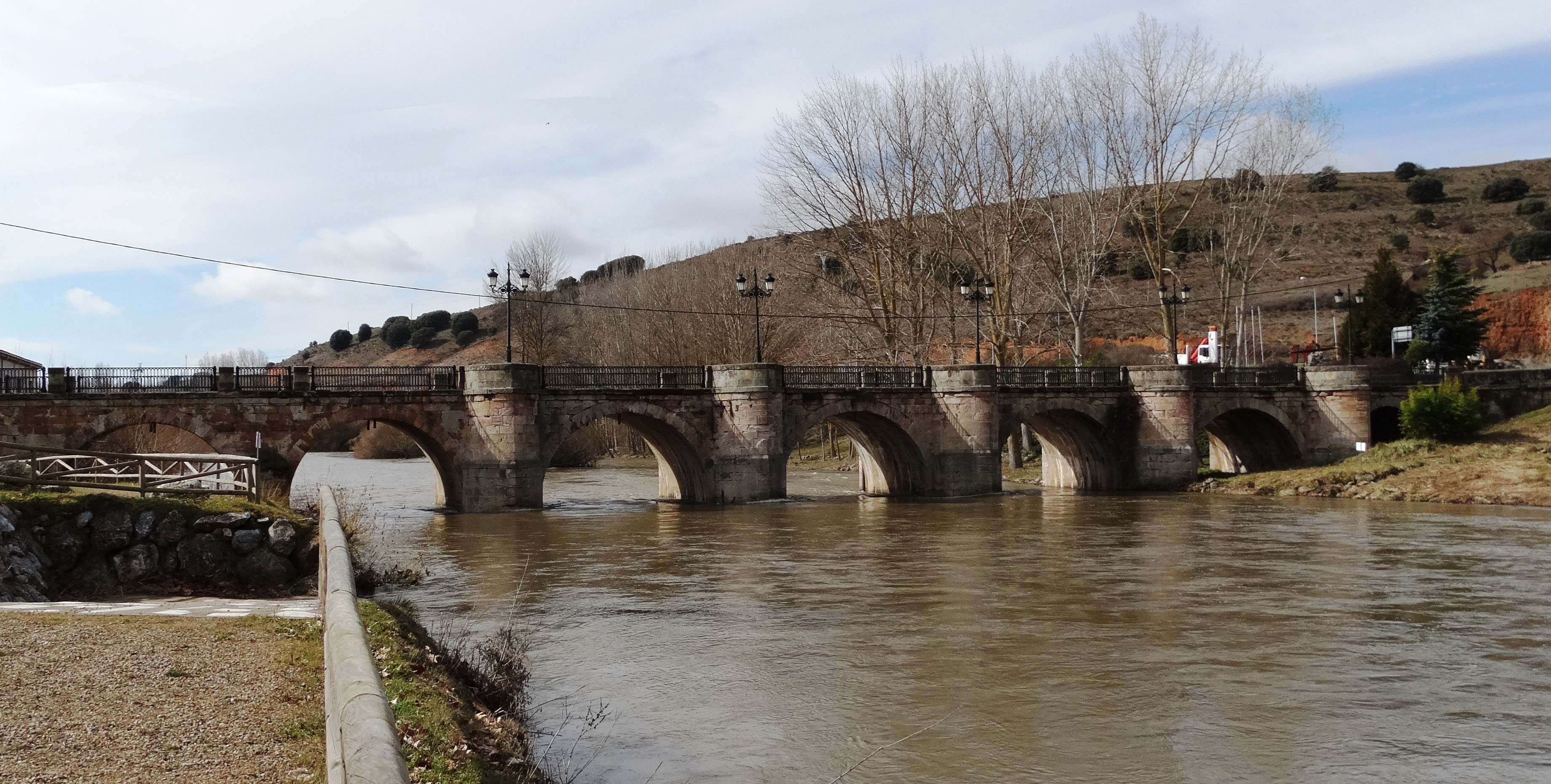 Alar del Rey. Puente de las Monjas sobre el río Pisuerga.